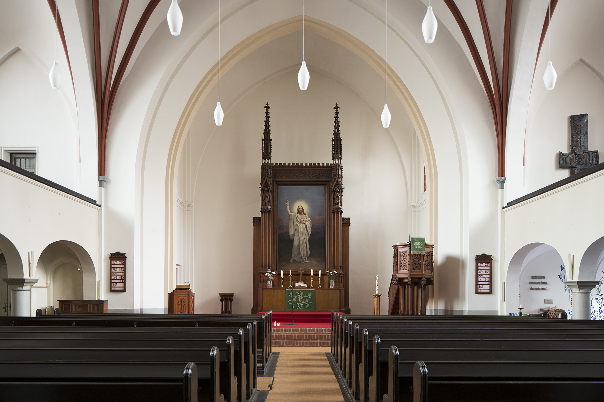 Paul-Gerhardt-Kirche, Berlin-Prenzlauer Berg, Wisbyer Straße 7